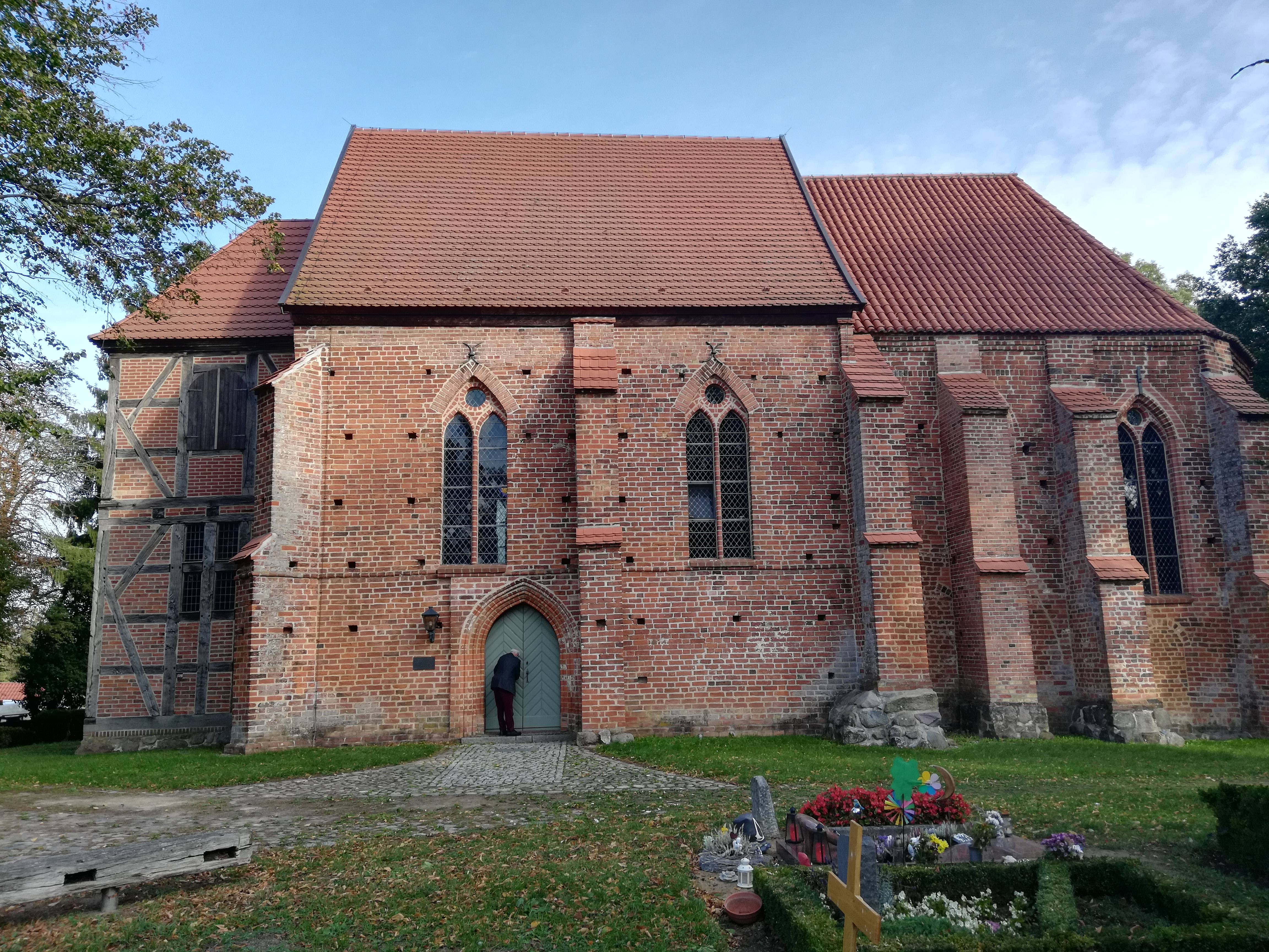 Dorfkirche Bibow